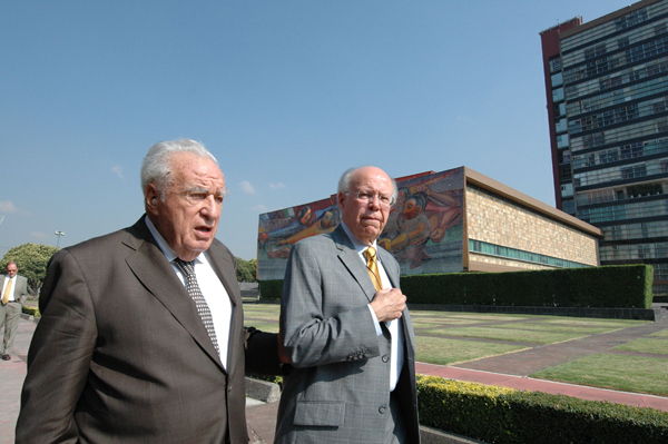 El periodista Julio Scherer y José Narro Robles, rector de la UNAM, caminando por Ciudad Universitaria. Autor: Carlos Requenes